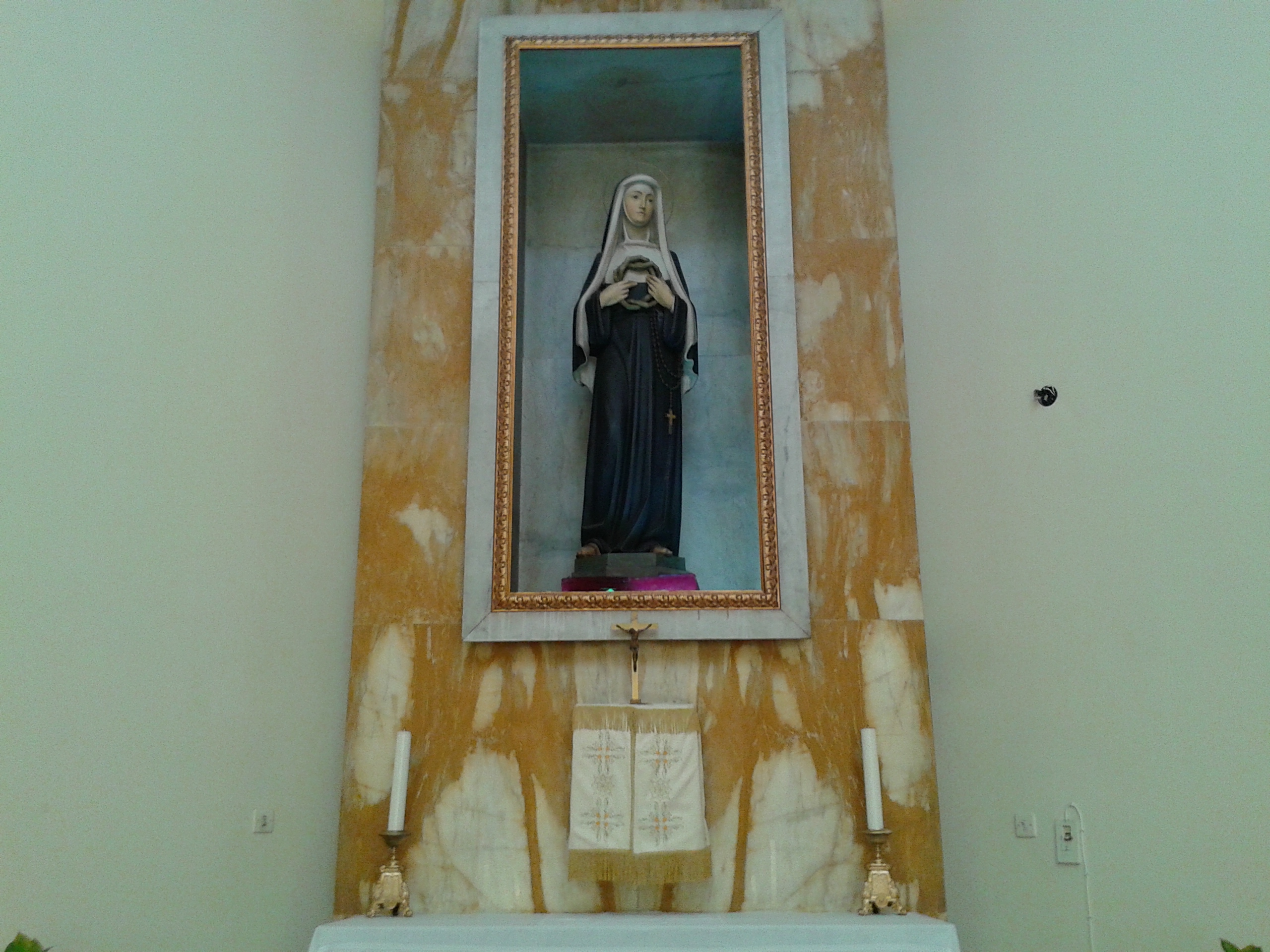 Statua di Santa Rita da Cascia venerata nella Chiesa di Maria Santissima Immacolata e San Rocco di Palmi